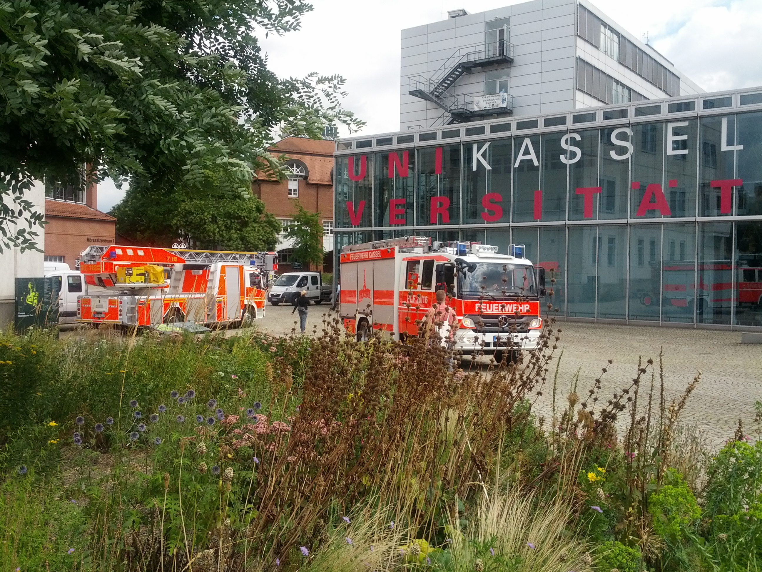 Feuerwehreinsatz auf dem Campus der Universität Kassel am 14. August 2013.